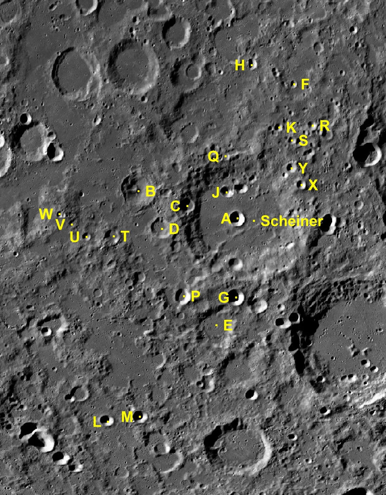 Cráter lunar Scheiner. Cráteres satélite. (Imagen LRO)